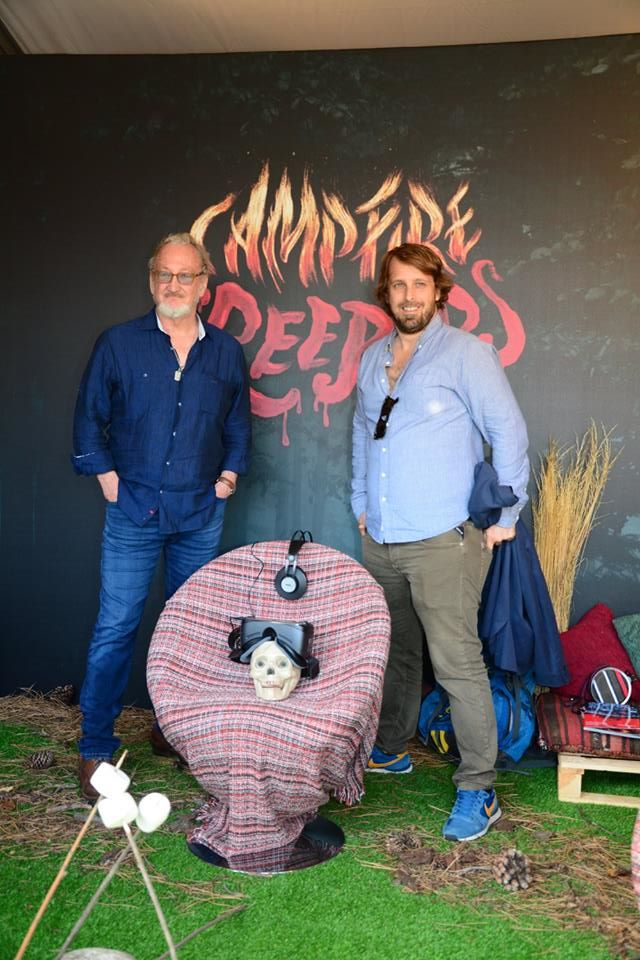 Robert Englund & Alexandre Aja - Presentació CAMPFIRE CREEPERS